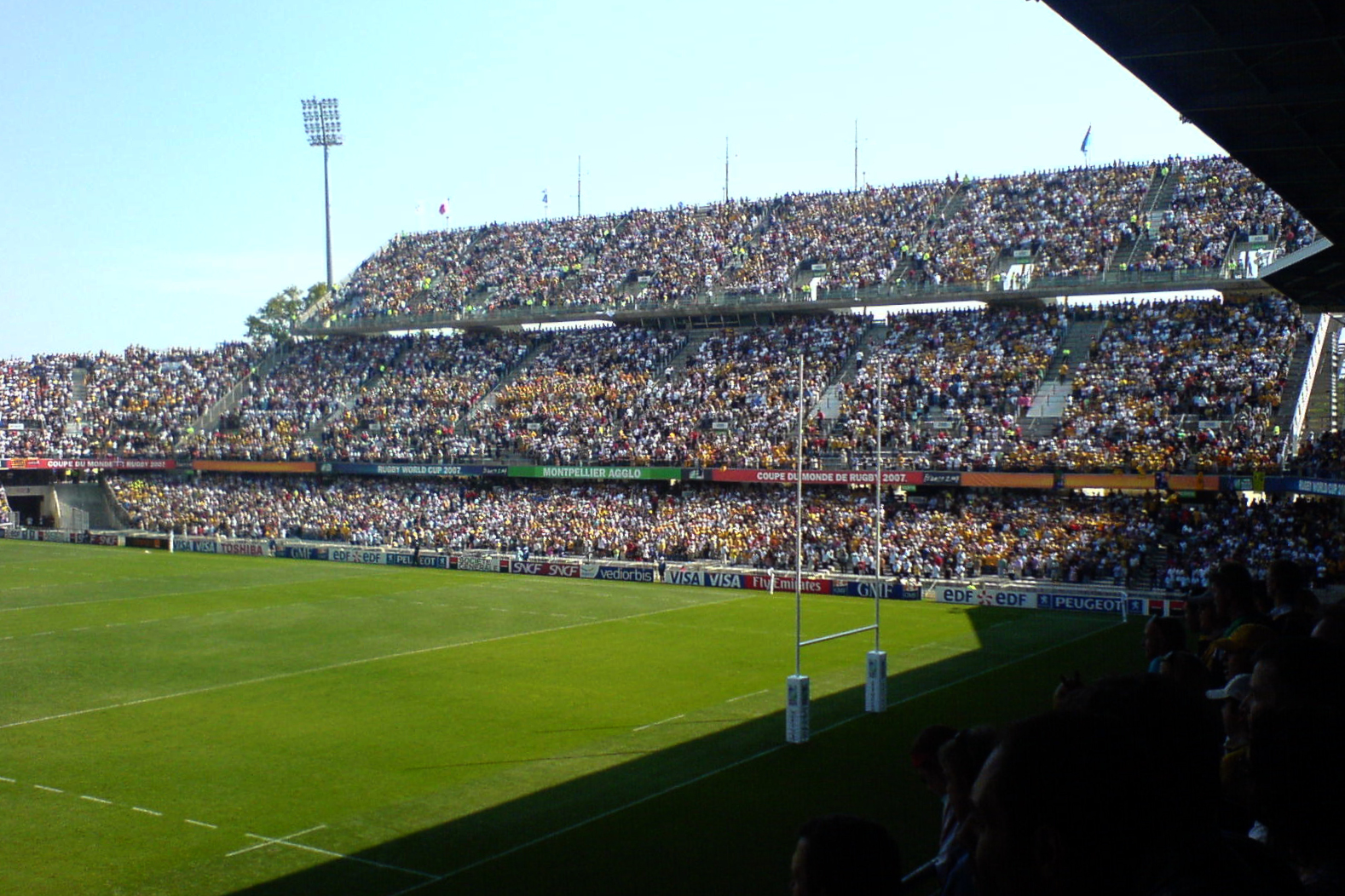 Match Australie-Fidji